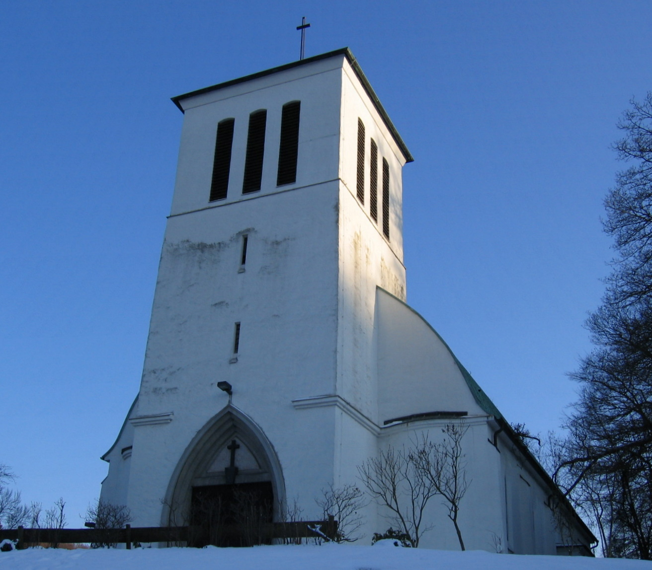 Description: Katholische Kirche St. Petrus Canisius im Stadtteil Westig in Hemer. Source: selbst fotografiert Date: 13. März 2006 Author: Asio otus